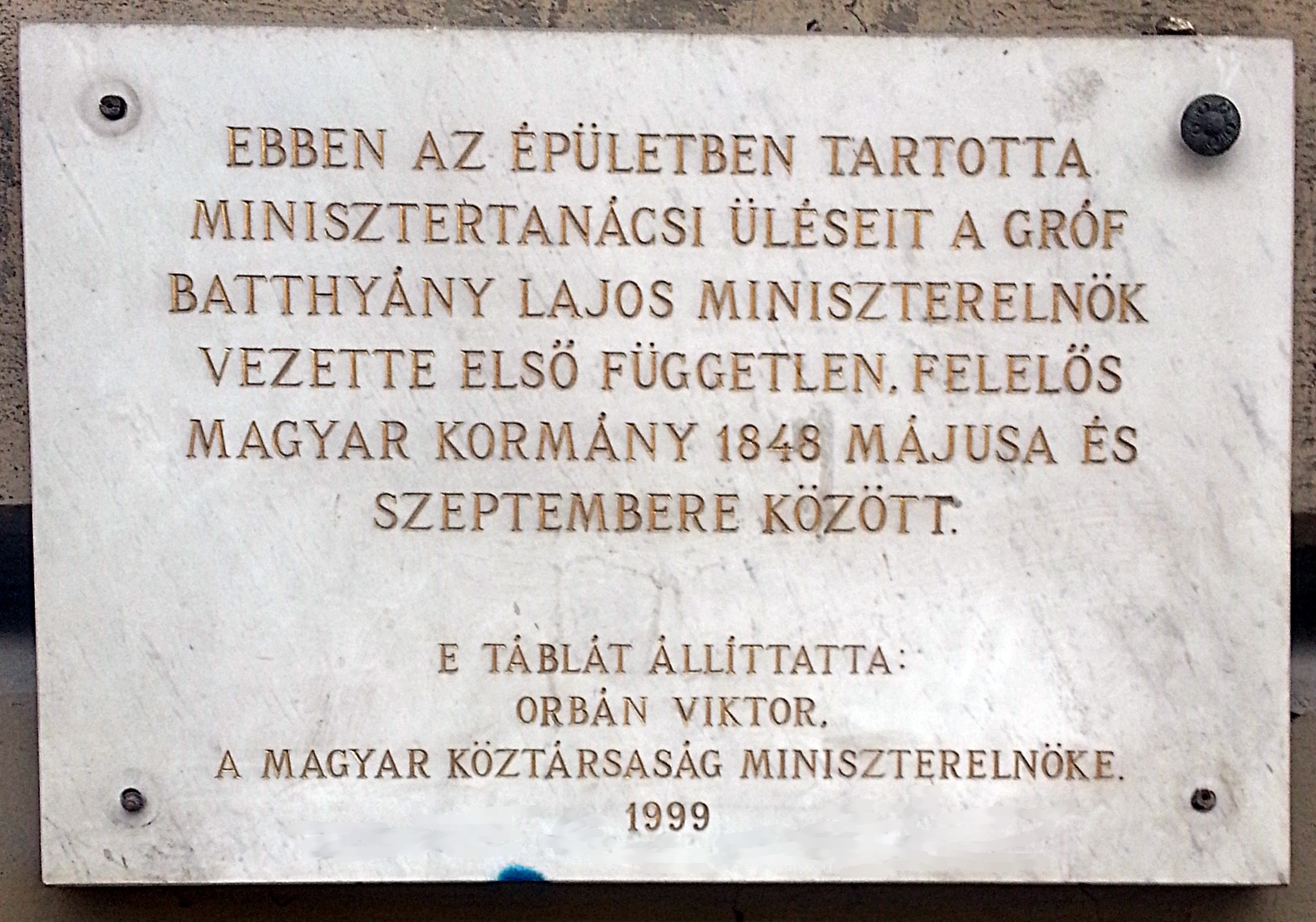 Batthyány Lajos és az első felelős magyar kormány emléktáblája Kossuth Lajos utca 3